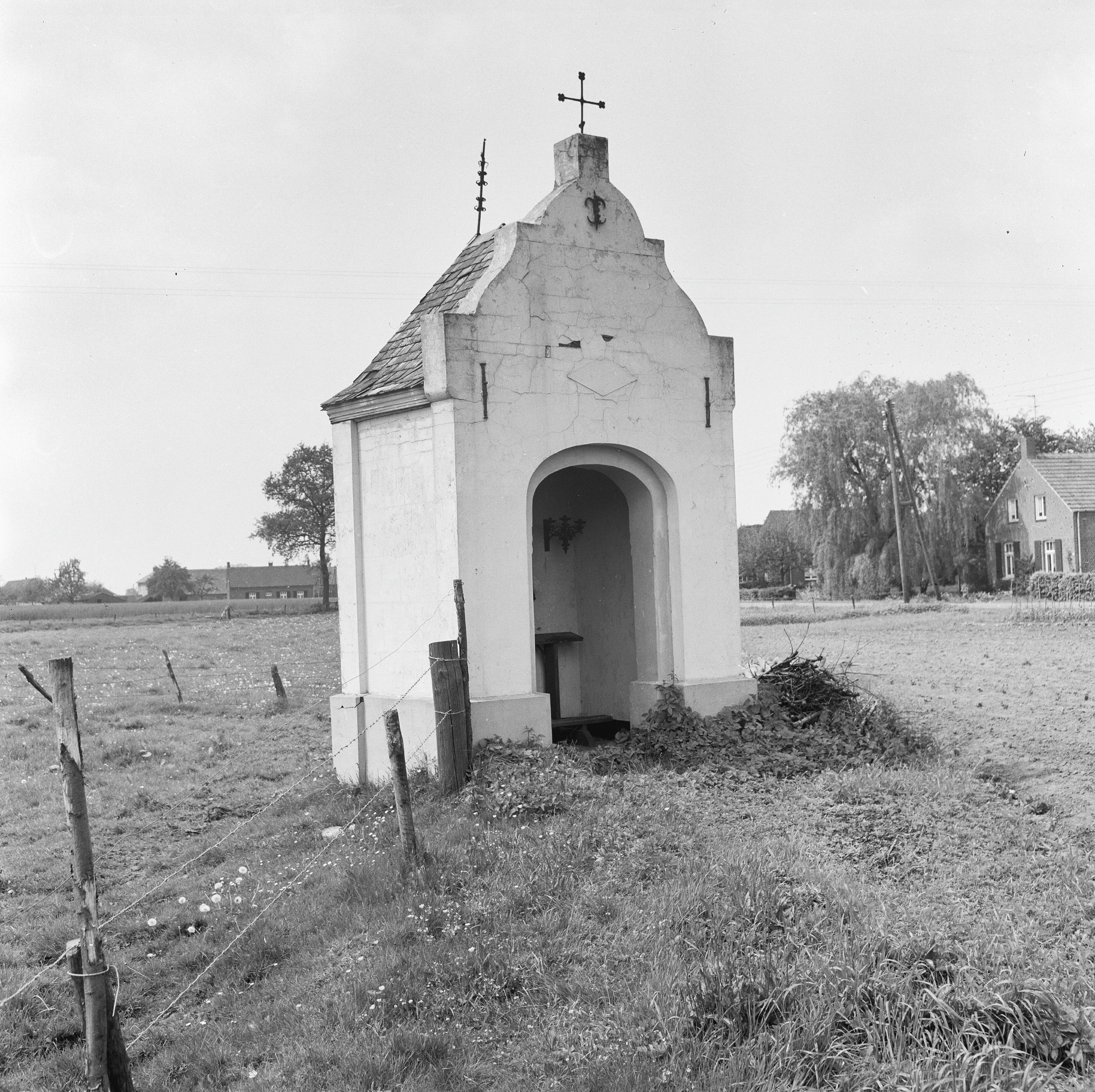 Sint Jozefkapel: exterieur - Sevenum, Renkenstraat / De Hees - Heilige Jozef